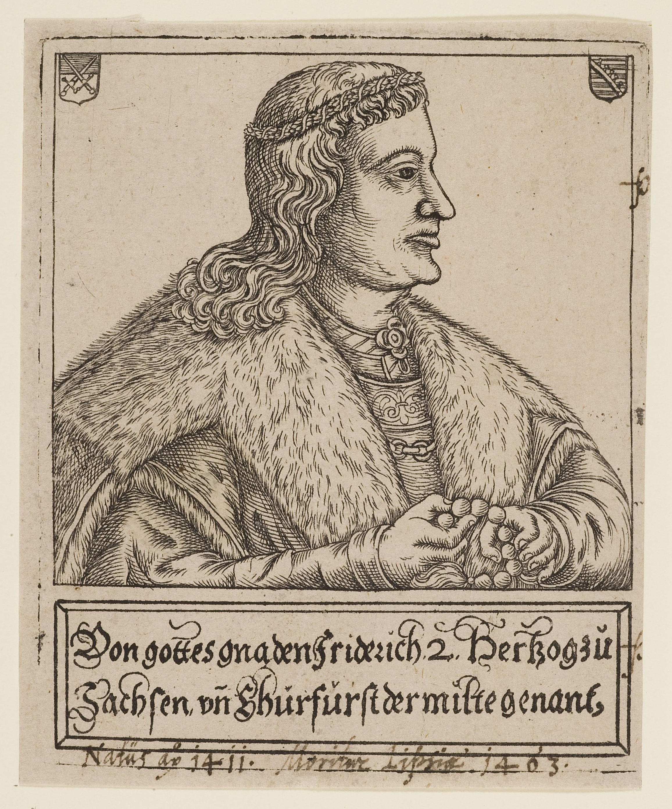 Friedrich II.